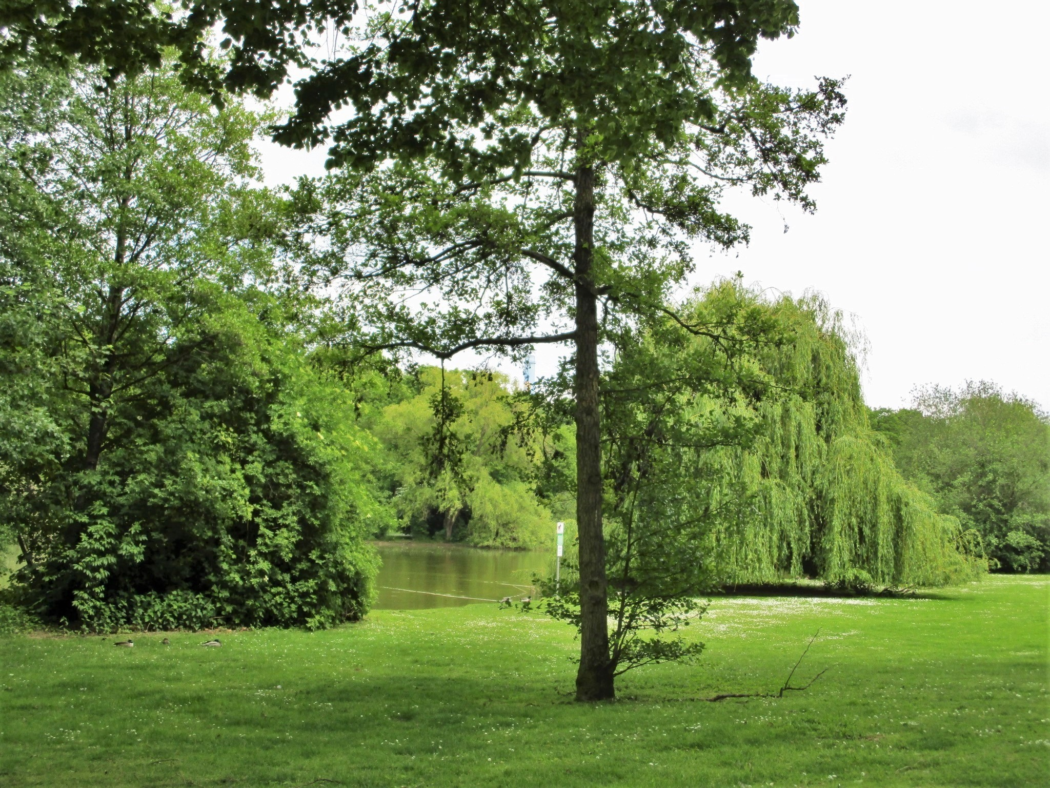 Martin-Luther-King-Park, Frankfurt-Niederursel, Weiher in der Mitte des Parks